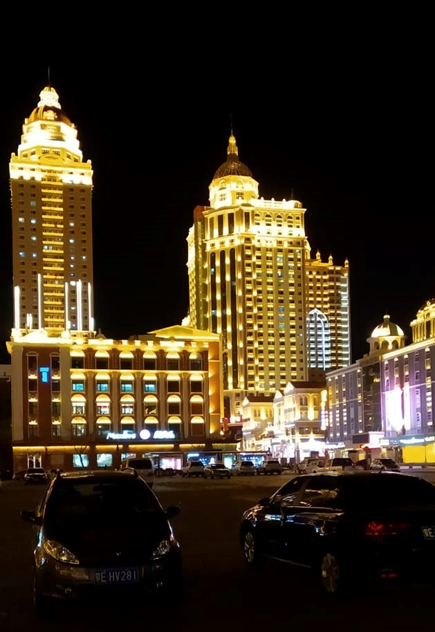 Square in the evening